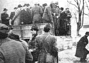 Italijanske racije v Ljubljani-prijete moške so pripeljali v vojašnico